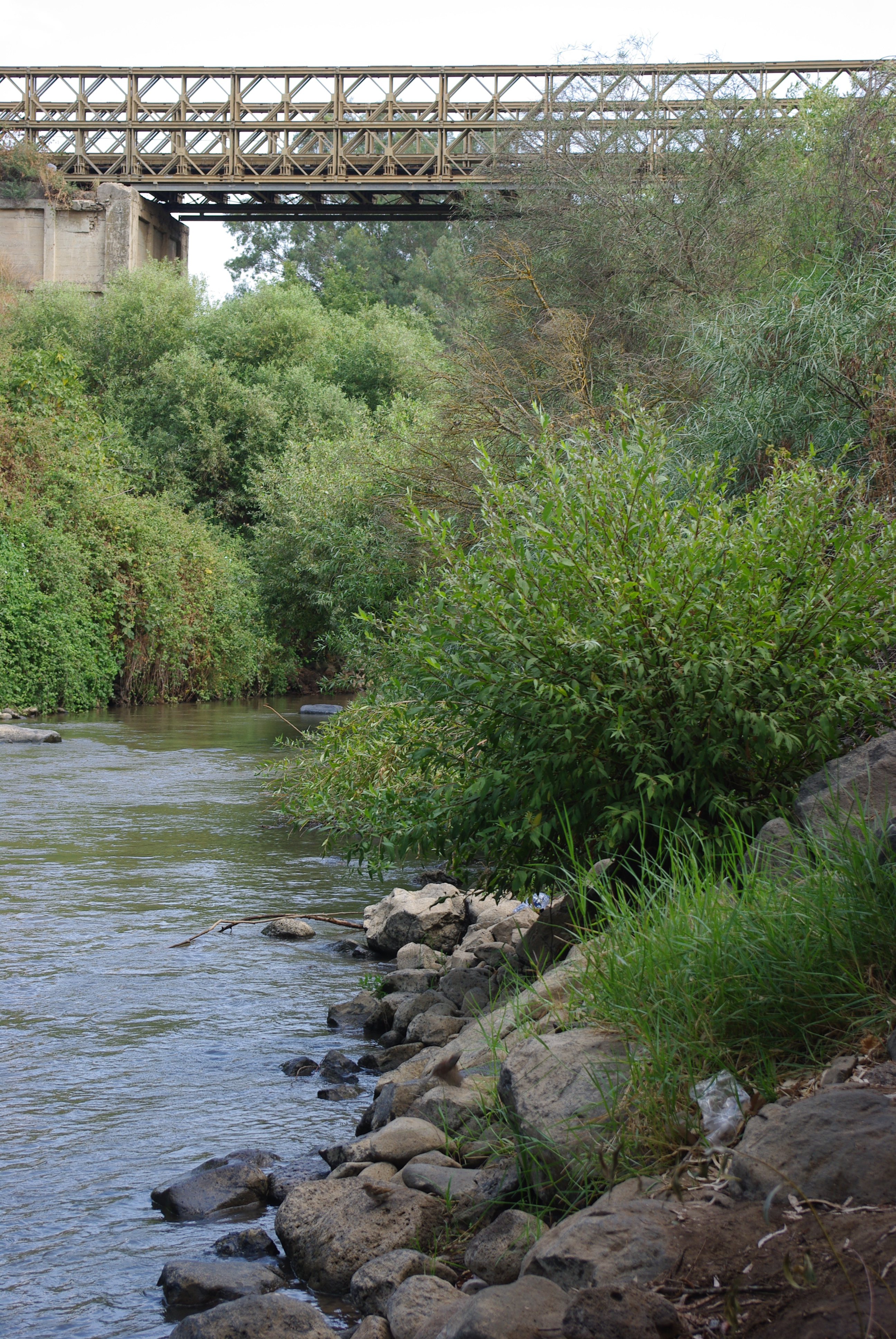 Ancien pont Bailey des filles de Jacob, aujourd'hui inutilisé